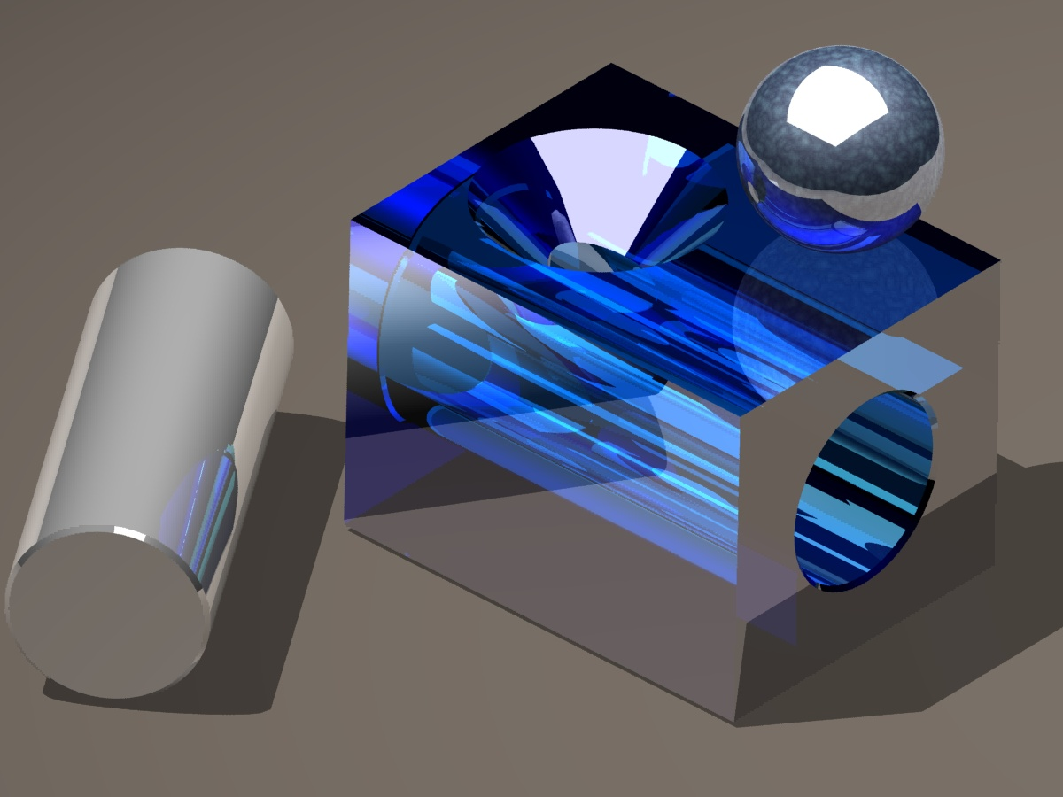 Exemples de surfaces simples utilisées pour la définition des liaisons mécaniques simples